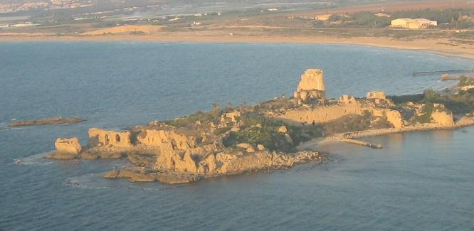 Image venant du wikipédia israélien Licence d'origine : domaine public